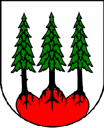 Blason de la commune suisse des Bois. Fait (vite et pas bien) par Degoratrax